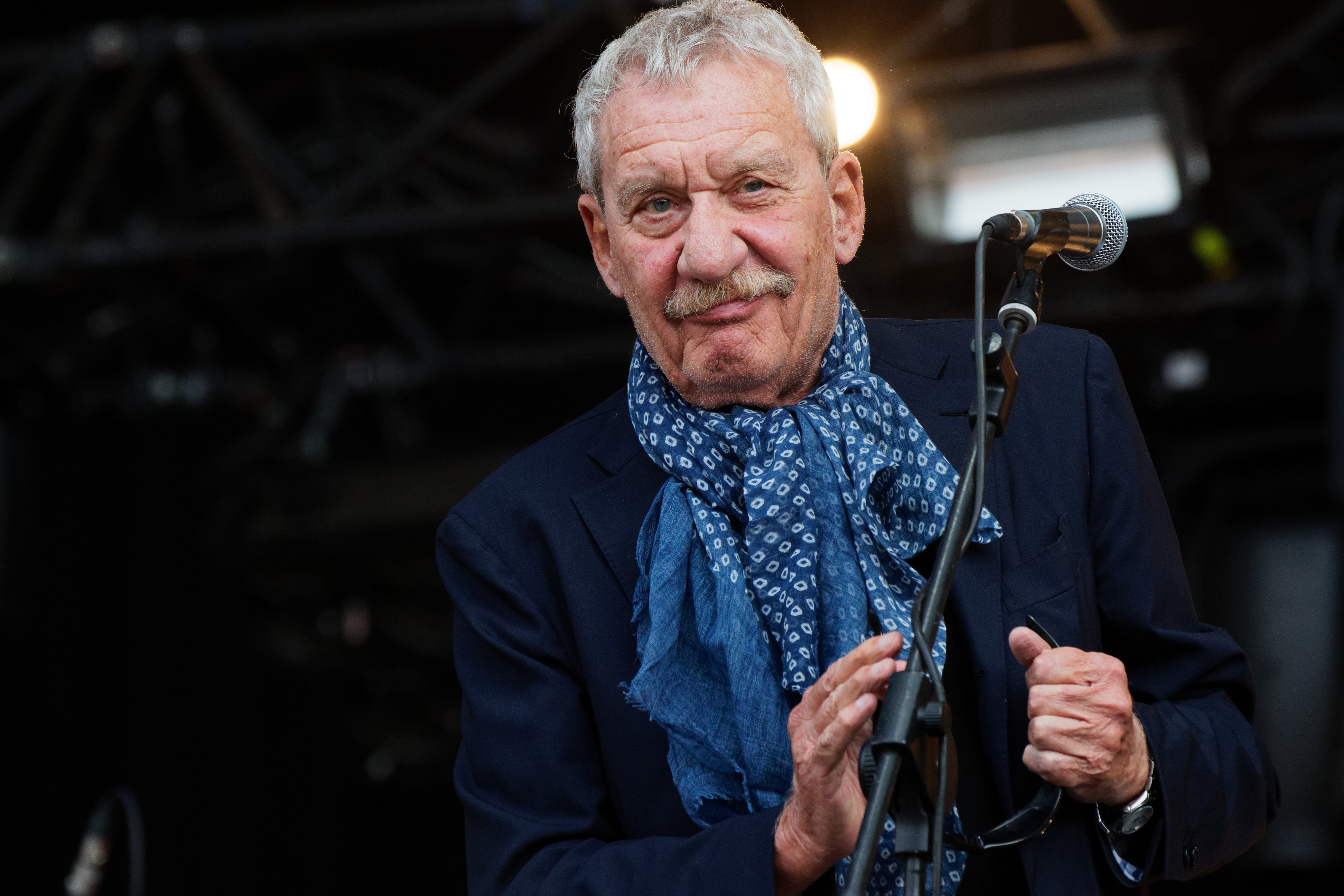 Paolo Conte en concert lors du festival des vieilles charrues 2017.